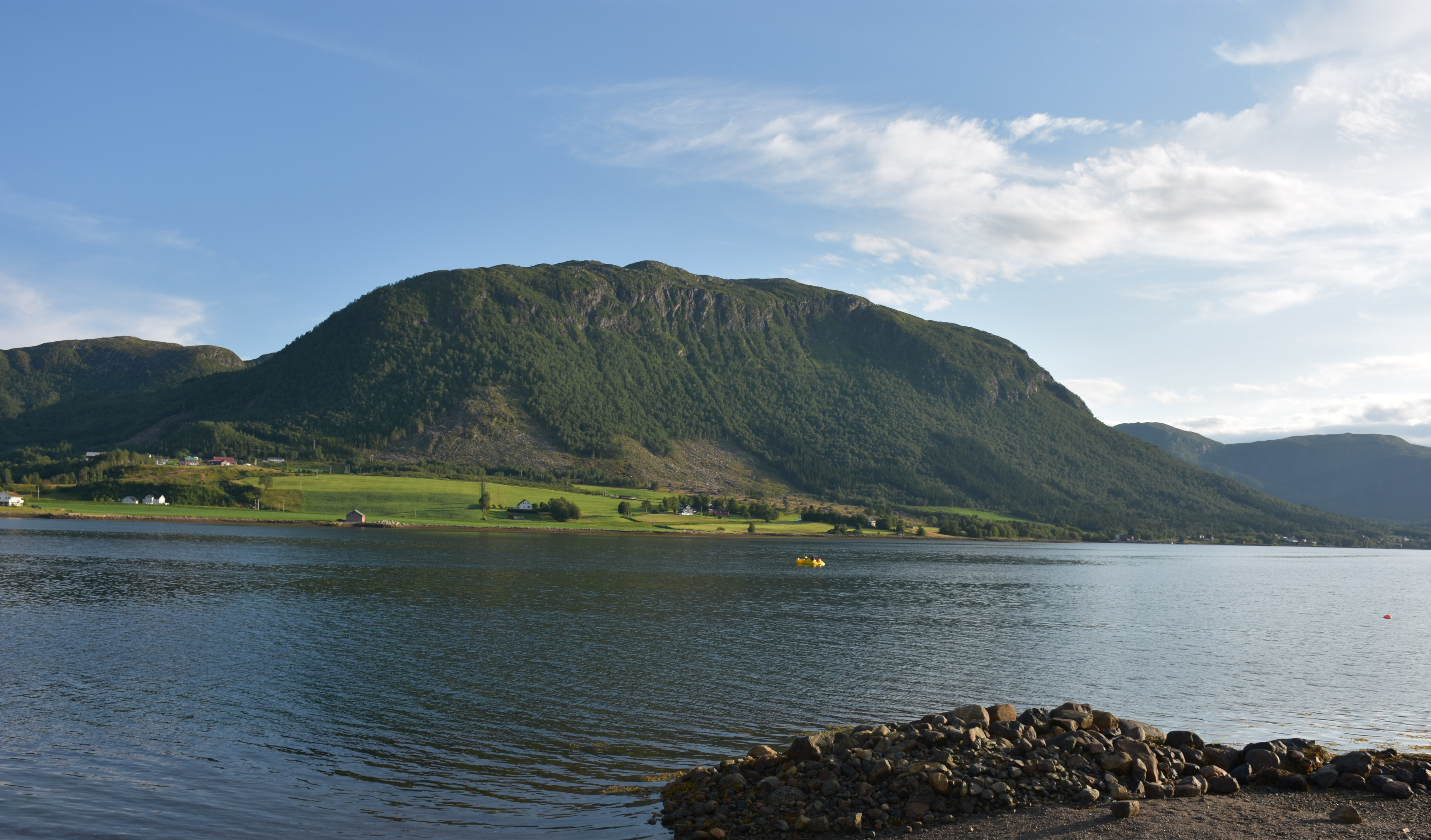 Malmefjorden i Fræna sett fra Bjølstad, med Røssholfjellet i bakgrunnen